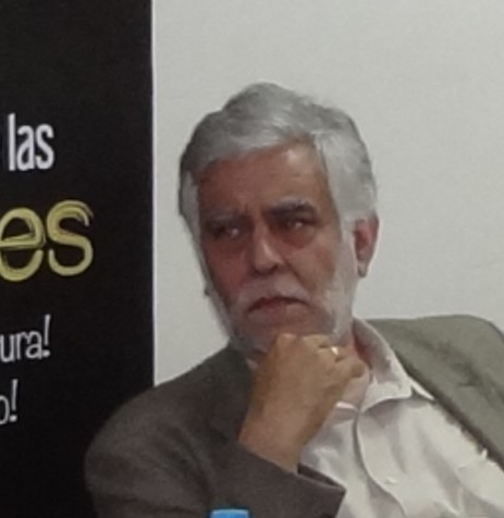 El escritor peruano Alonso Cueto en la Feria del Libro de Quito - diciembre 2011.